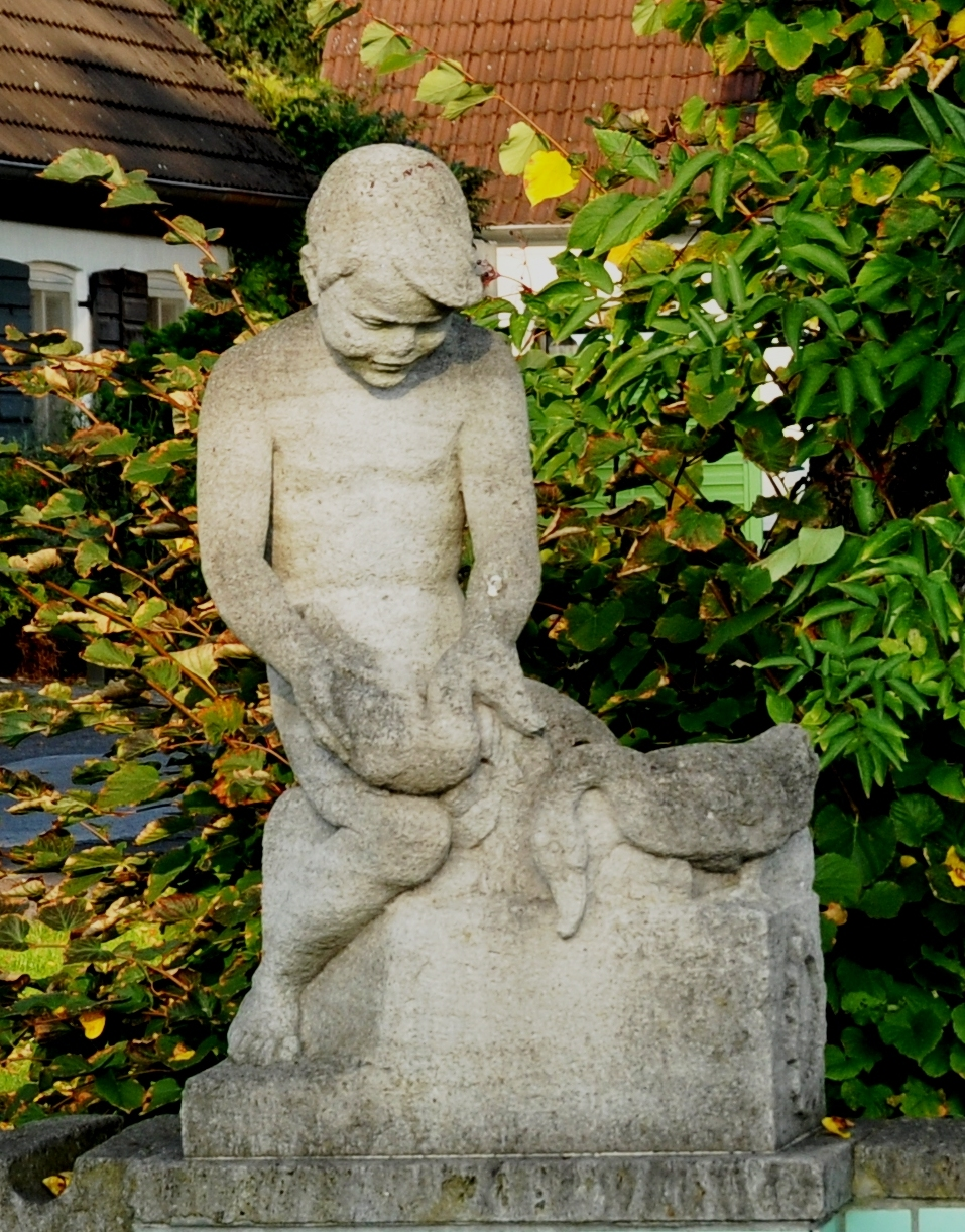 Nordparksiedlung in Düsseldorf. Gänsebrünnchen aus Muschelkalk von August Wilhelm Goebel